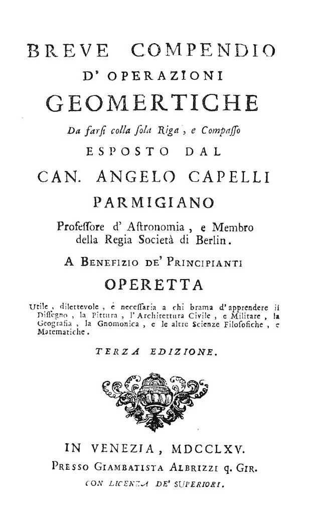 Breue compendio d'operazioni geometriche da farsi colla sola riga, e compasso esposto dal can. Angelo Capelli parmigiano ... A benefizio de' principianti operetta utile, dilettevole, e necessaria a chi brama d'apprendere il dissegno, la pittura, l'architettura civile, e militare, la geografia, la gnomonica, e le altre scienze filosofiche, e matematiche. - In Venezia : presso Giambatista Albrizzi q. Gir., 1765. - XVI, 130 p. : ill. ; 8º .